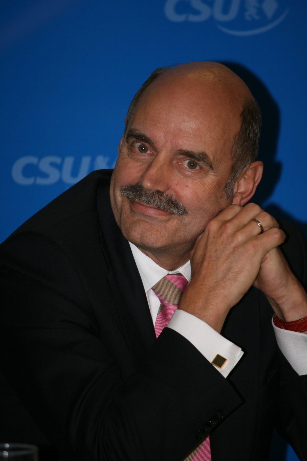 Hans Schaidinger, CSU-Politiker, Oberbürgermeister von Regensburg, Vorsitzender des Bayerischen Städtetags bei einer Veranstaltung in Kemnath